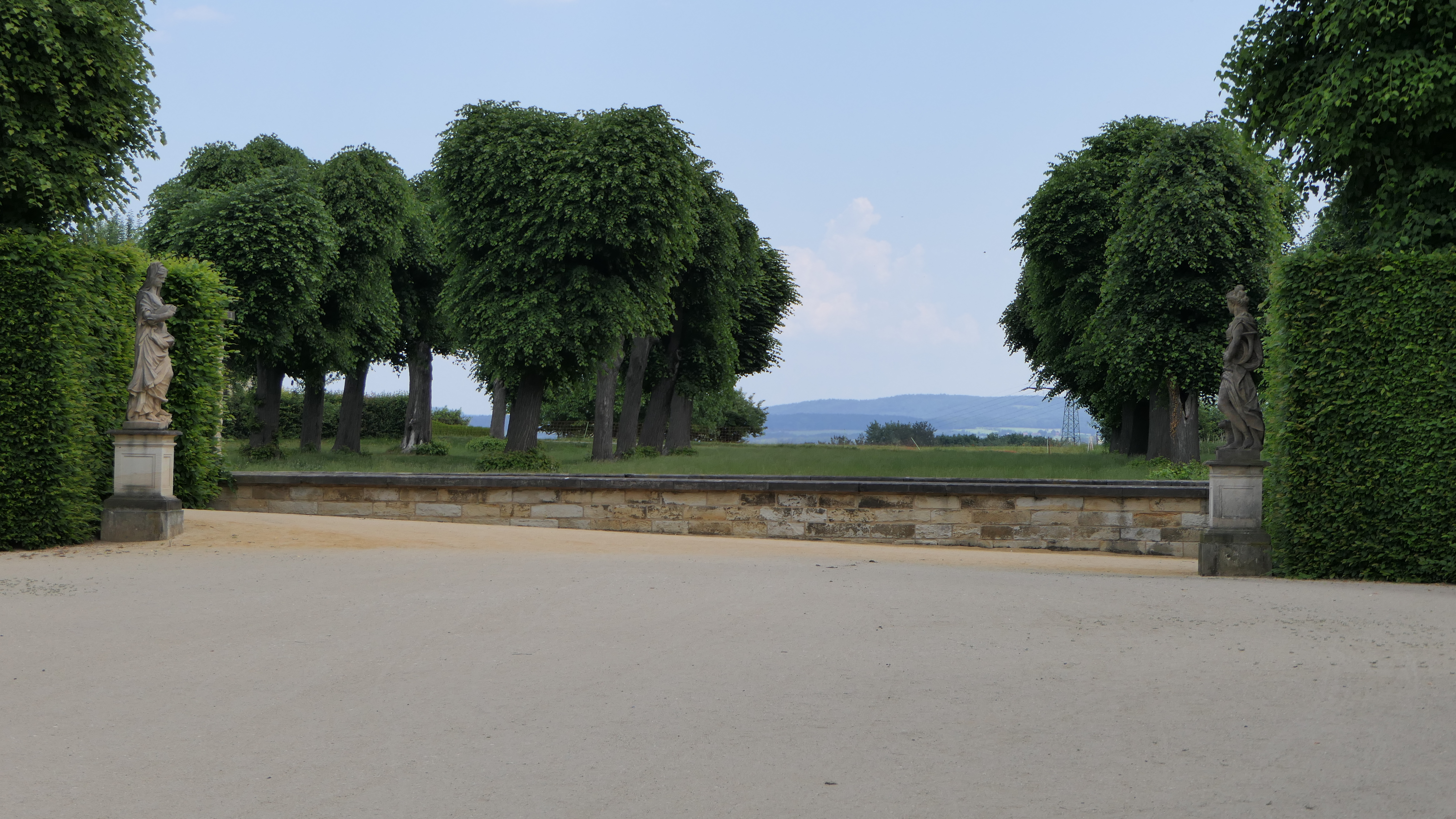 Aha-Graben, auch "Hasensprung" genannt, im Barockgarten Grosssedlitz